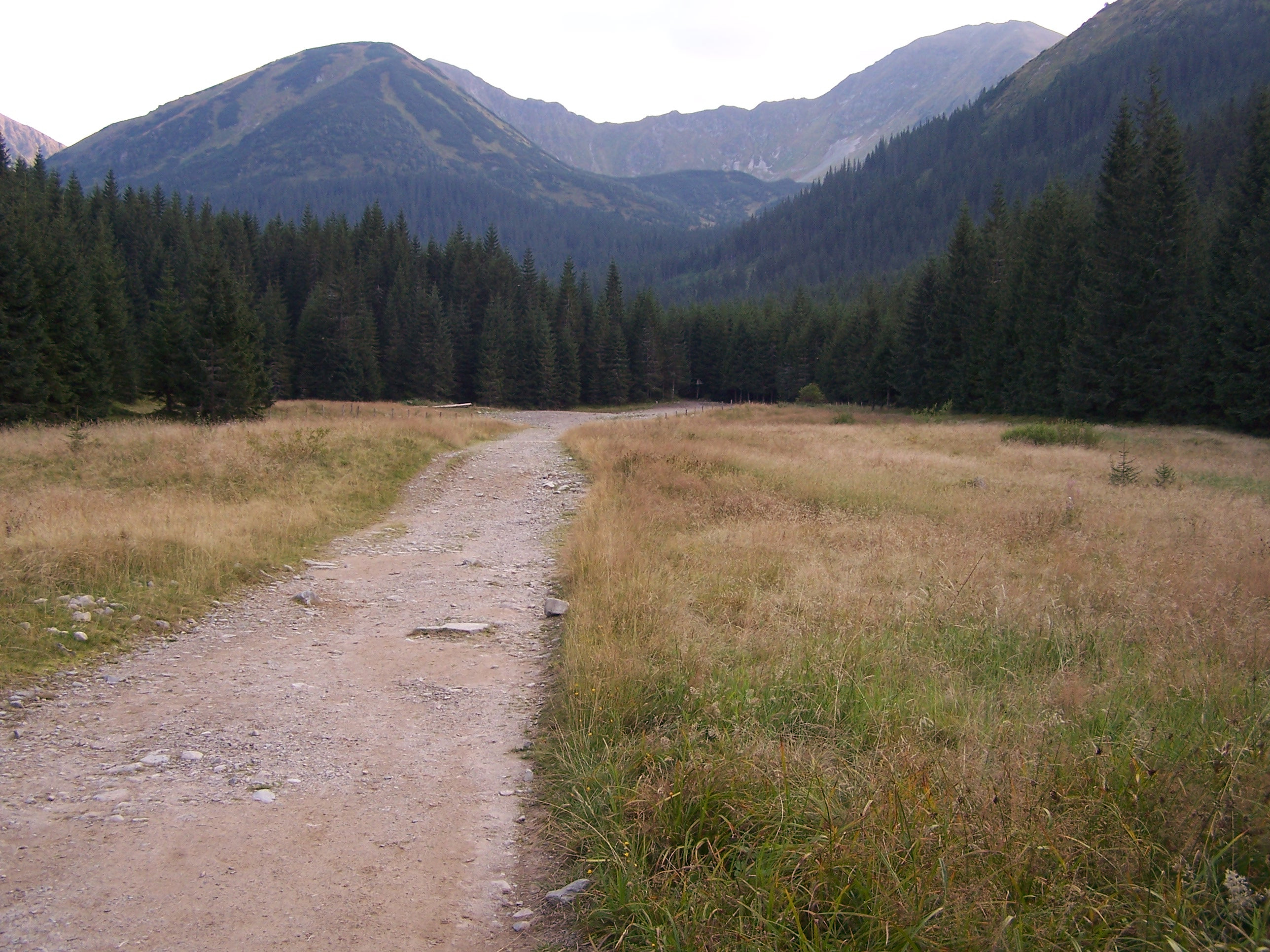 Wyżnia Polana Jarząbcza {Dolina Chochołowska)